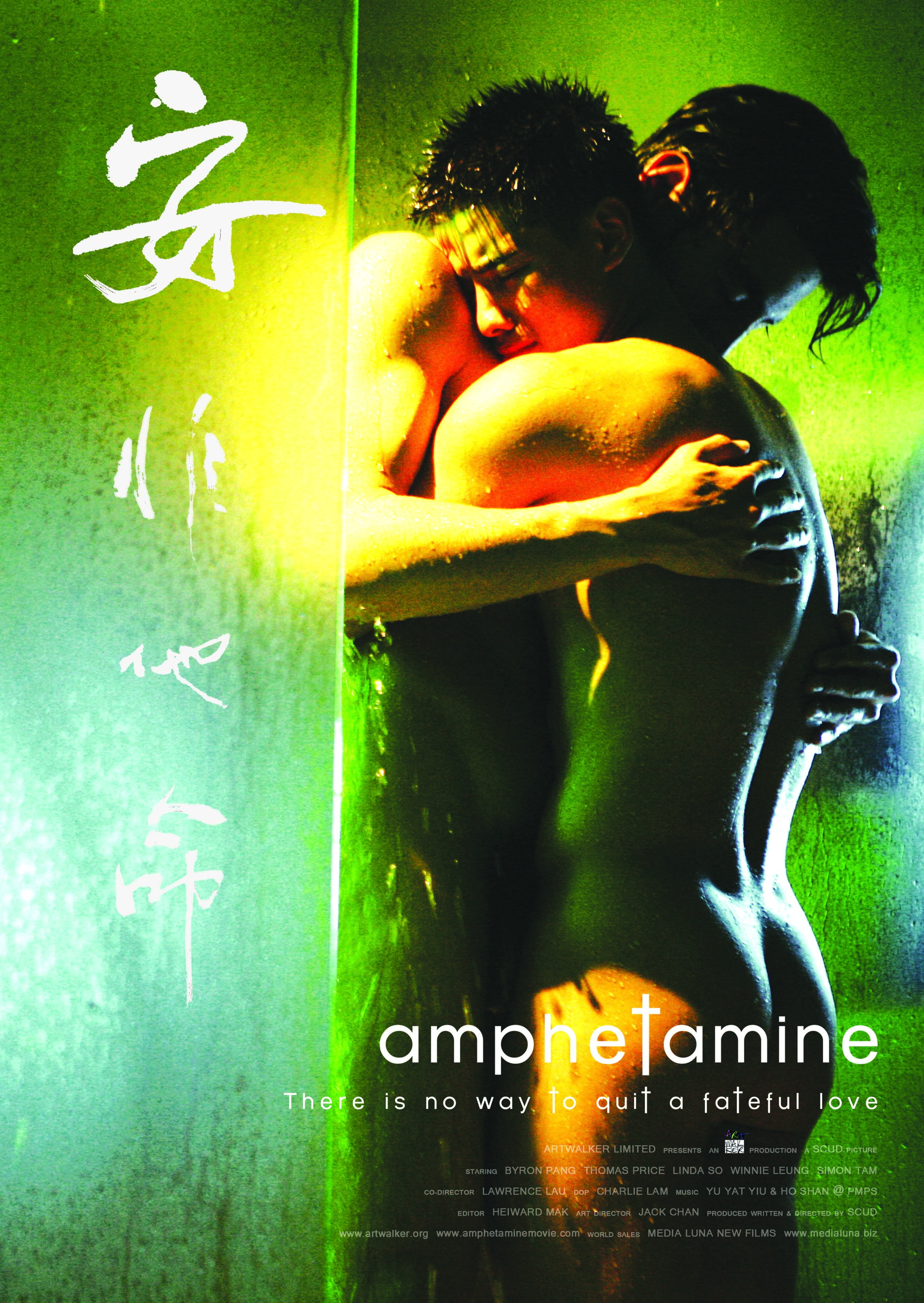 命中註定的相遇，讓不同世界的兩條生命線相交。同樣的年少輕狂，可否讓他們愛得義無反顧，忘卻彼此的過去？ 寒鴉般命途的Kafka，一心只想努力工作，掙足夠的錢讓重病的母親過上好日子，郤遭受到一般人難以想像的重大變故﹔那些無法抺滅的傷痛，讓他一步步走進「安非他命」的深淵。 缺愛的他遇上了對他一往情深的Daniel，親耳聽見他說「從第一次見到你哭，我就決定留在你身邊，不讓任何人傷害你」。Kafka想接受這種不屬於他天賦的愛，而Daniel也包容他的所有。兩位青年相信他們的愛可以跨越一切鴻溝，然而世上也許本無戒不了的毒，只有戒不了的愛。 「安非他命」，難道那不就是他的命嗎？這是一部有關毒品、愛情、命運的青春輓歌，獻給除了愛就找不到生存的理由，而又曾經失去生命中最愛的人們。